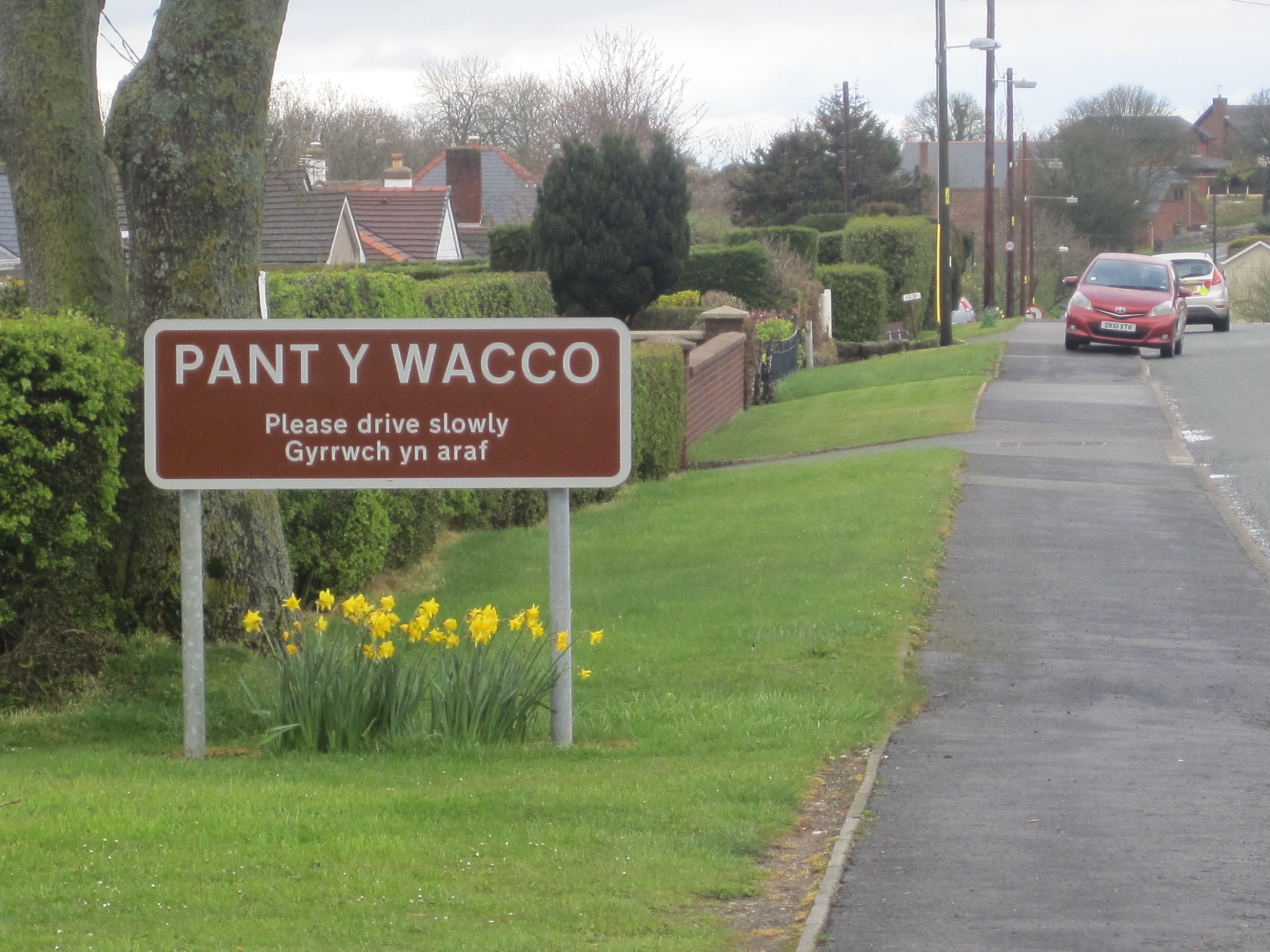 Pentref bychan rhwng Gorsedd a Lloc, ger Treffynnon, Sir y Fflint.